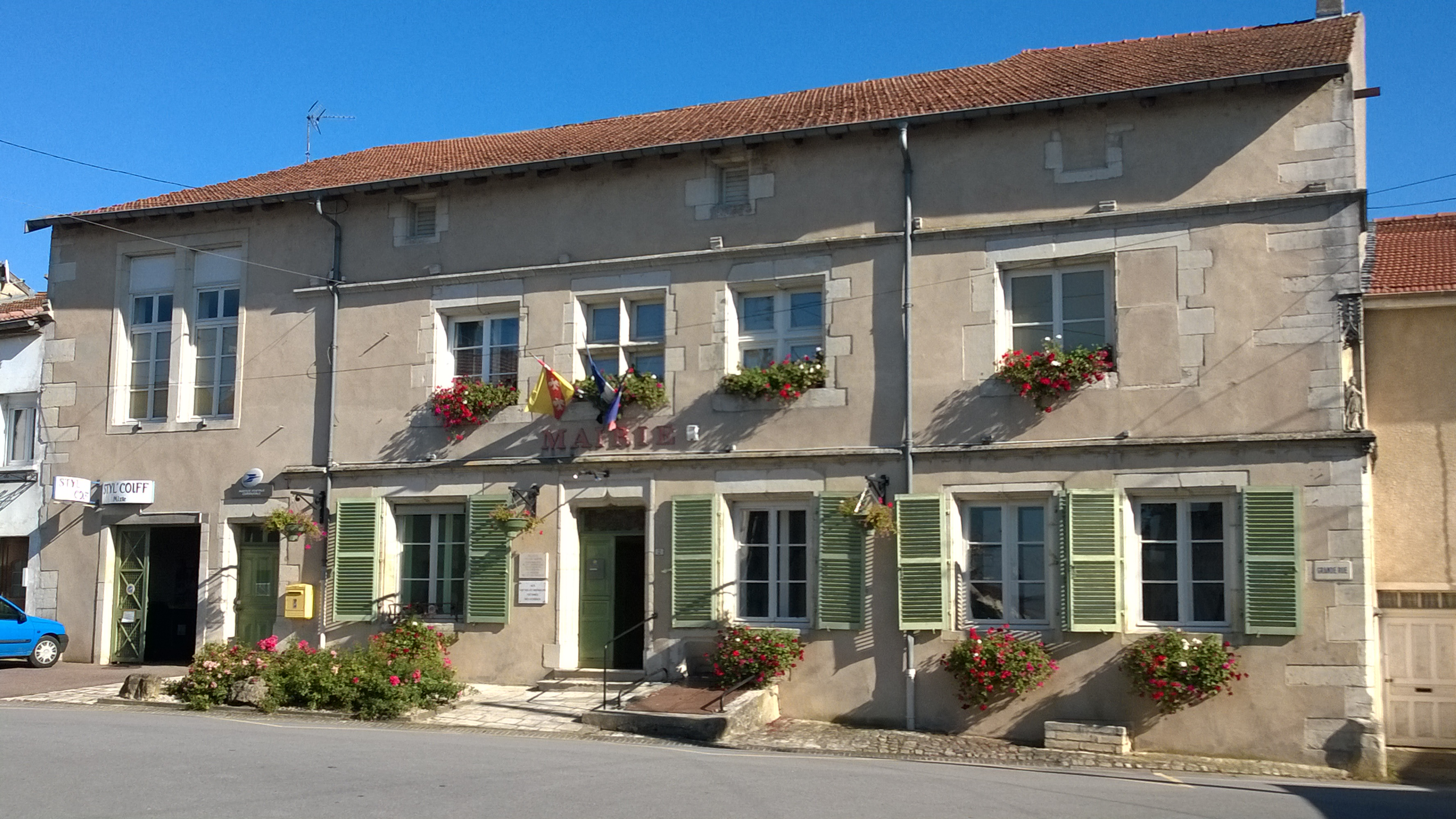 Mairie de Pulligny (Meurthe-et-Moselle, France)